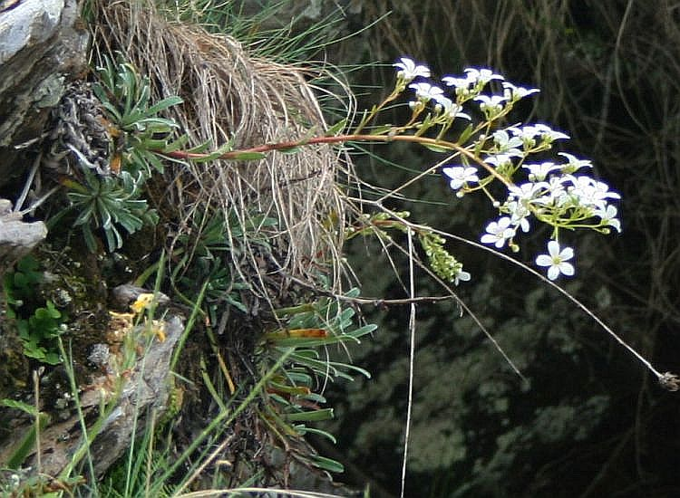 Saxifraga callosa subsp. callosa, Steinbrechgewächse (Saxifragaceae) - Italien/Italia/Italy: Toscana, Prov. Lucca, Parco Regionale delle Alpi Apuane, an der Straße zwischen Orto di Donna und Gramolazzo